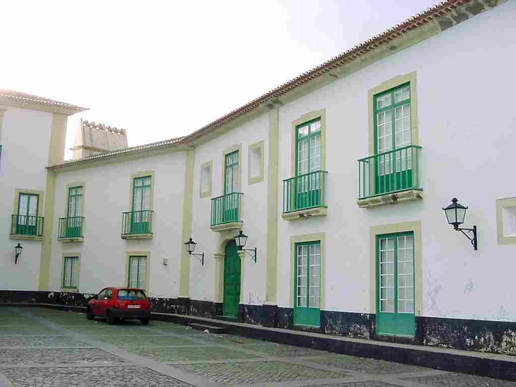 Solar do Provedor das Armadas, Angra do Heroísmo, ilha Terceira, Açores, Portugal.